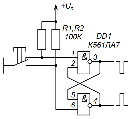 Схема устранения дребезга контактов с использованием RS-триггера